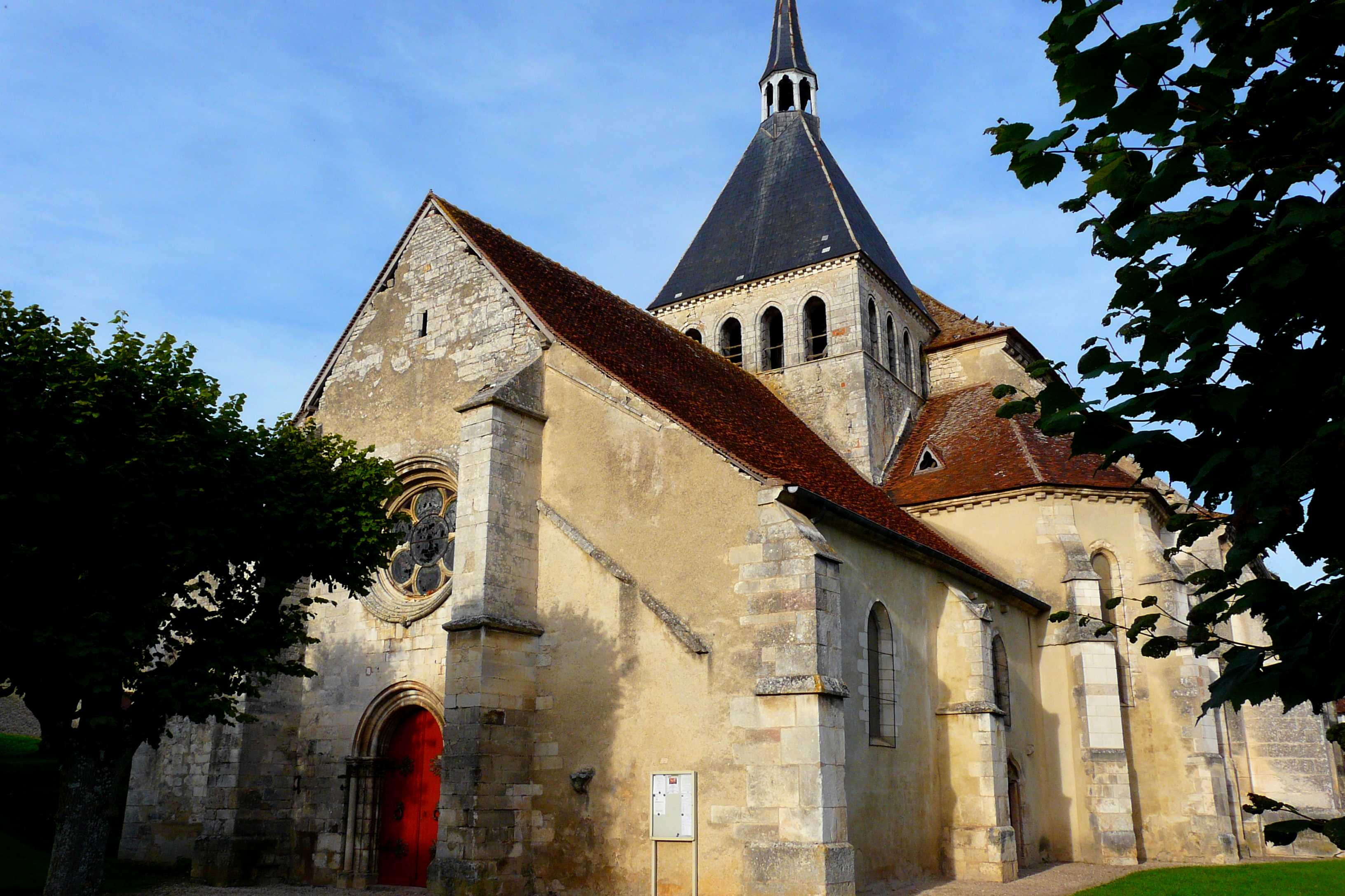 Église Notre-Dame de Dannemoine (Classé) .